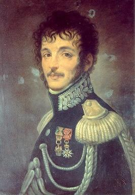 Teodoro Lechi, Napoleon's general (1778-1886)